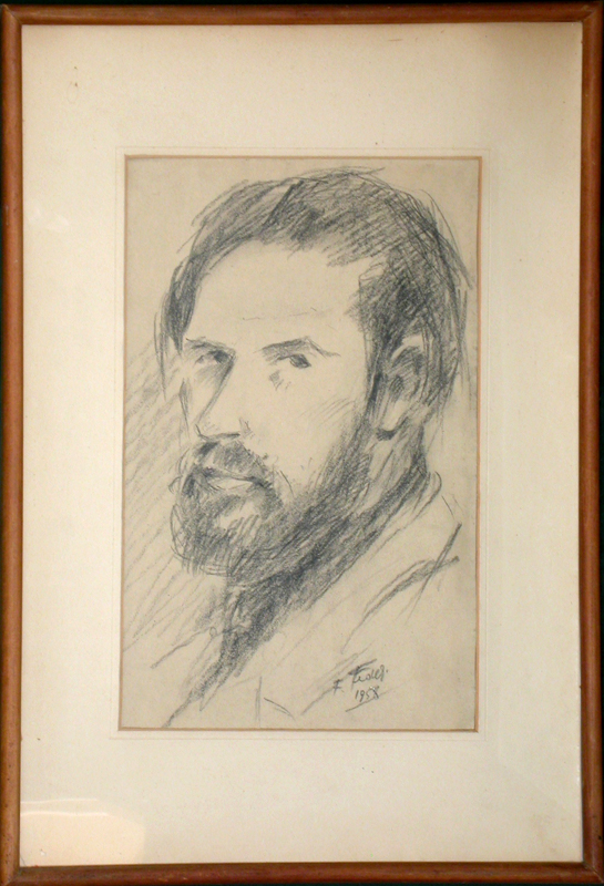 Autoritratto